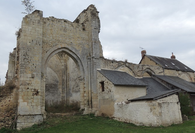 Prieuré Saint-Jean-Baptiste de Villedieu-le-Château, ruines du coeur de l'église avec une belle voûte entre deux piliers avec colonnettes et le haut des arcatures de la nef côté Nord au dessus de petites constructions empruntant ce mur Nord bâties qui à l'intérieur qui à l'extérieur de l'église